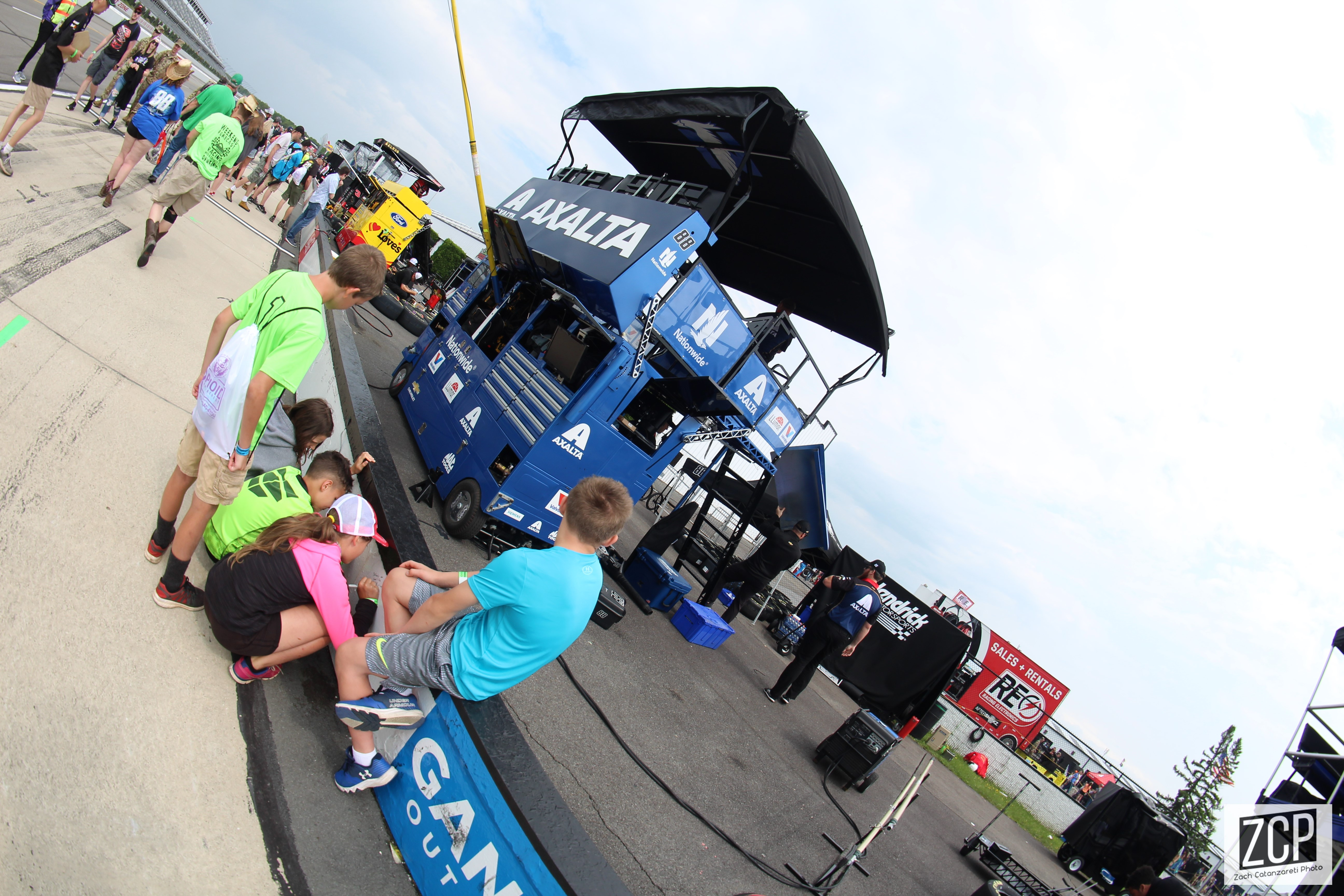 2019 Pocono 400